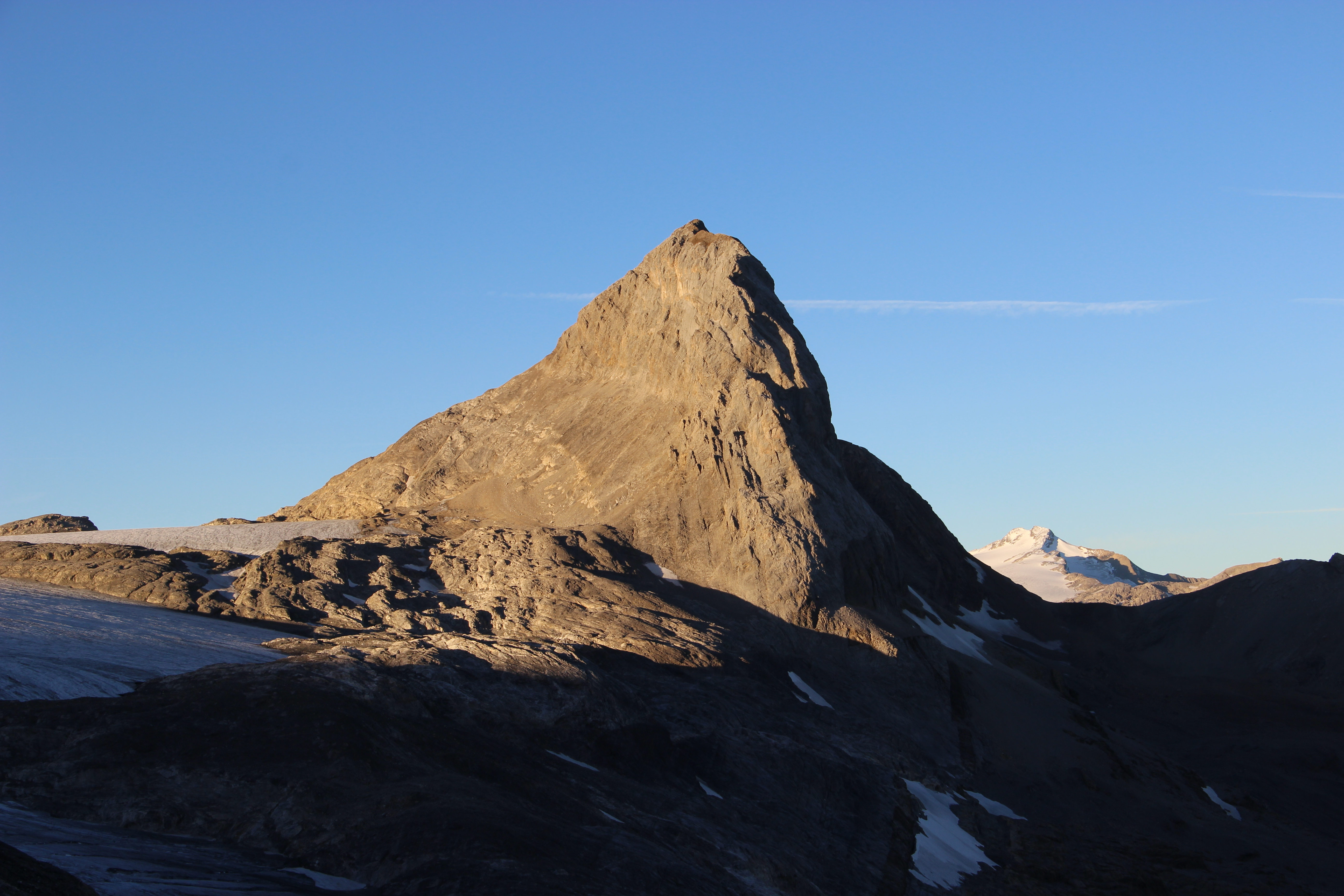 Gletscherhorn